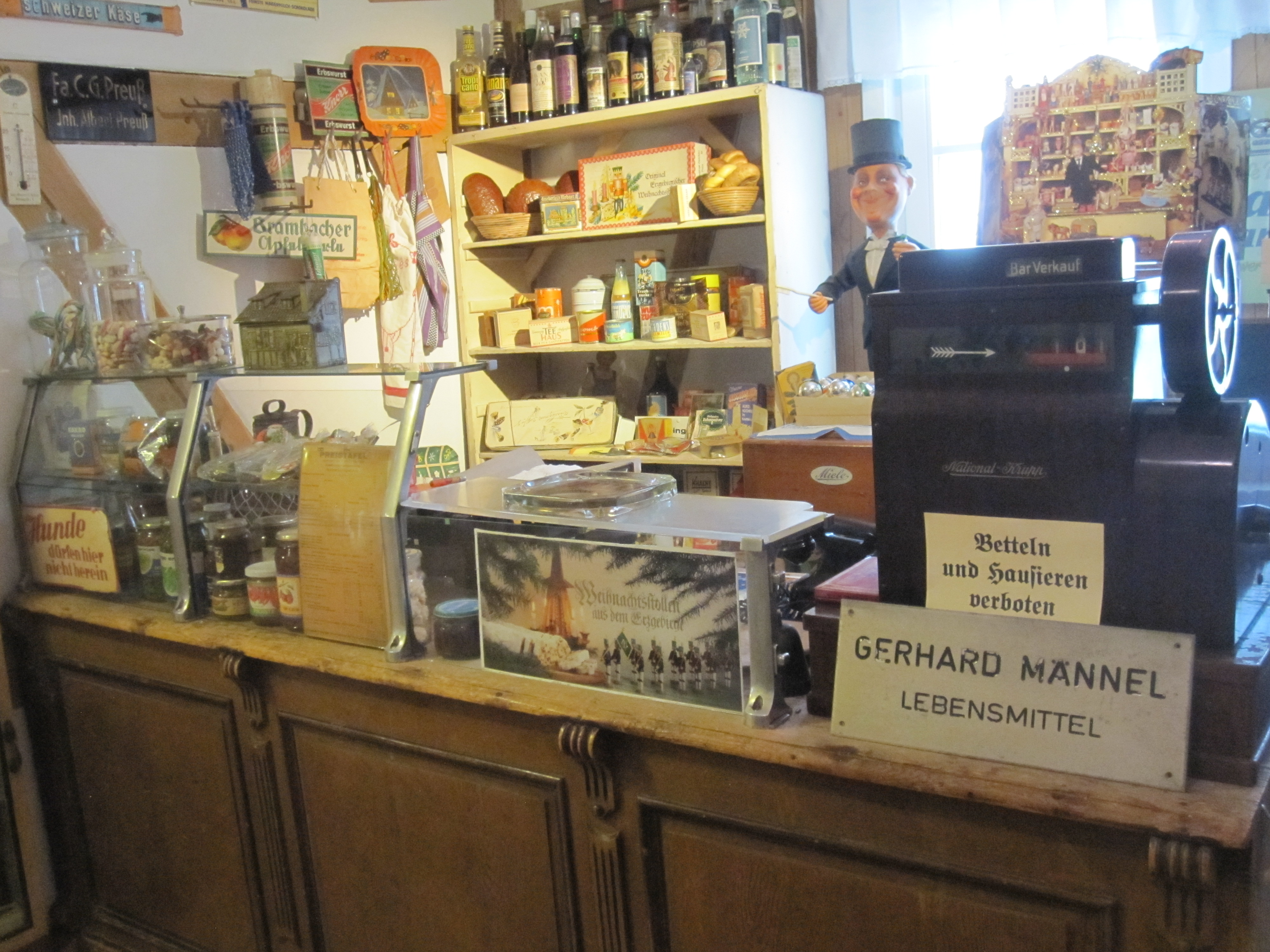 Bürsten- und Heimatmuseum Schönheide: Lebensmittelladen in der Dauerausstellung.